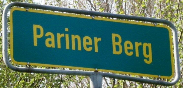 Schild "Pariner Berg"